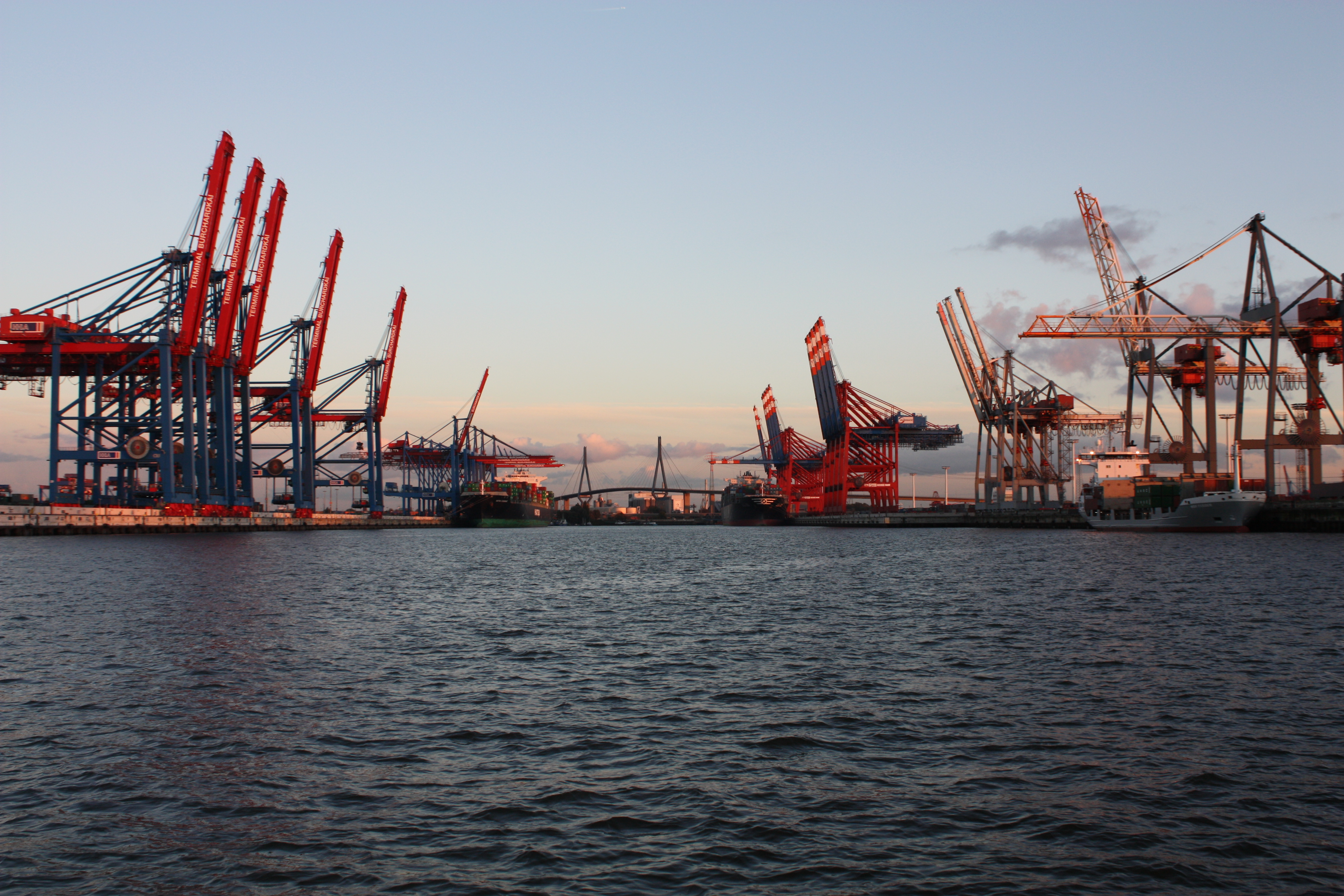 Blick von der Norderelbe in den Waltershofer Hafen. Links der Container Terminal Burchardkai, rechts der Eurogate Container Terminal am Predöhlkai. Im Hintergrund ist die Köhlbrandbrücke zu sehen.